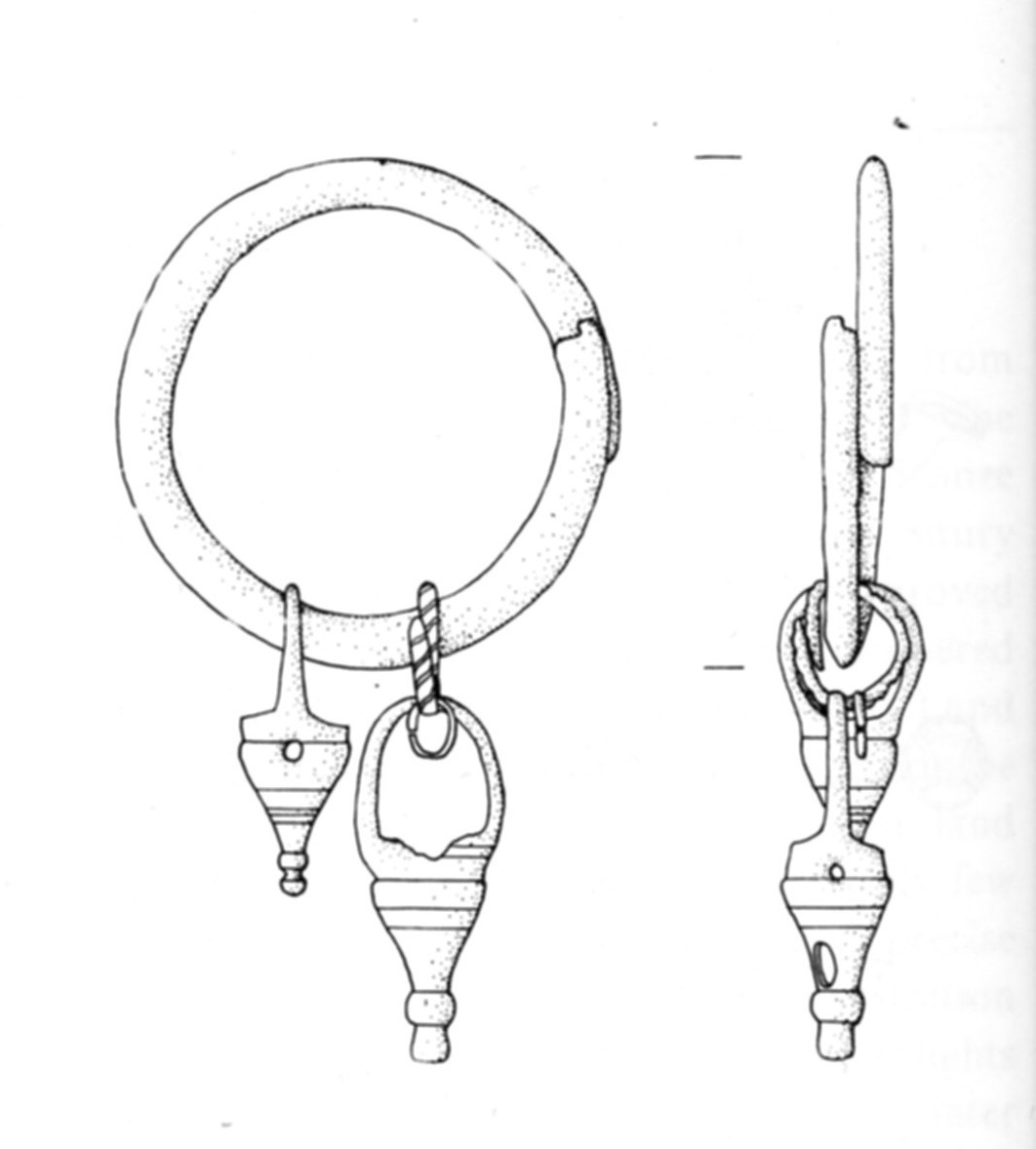 Elemento a corredo della tomba golasecchiana di Plesio.